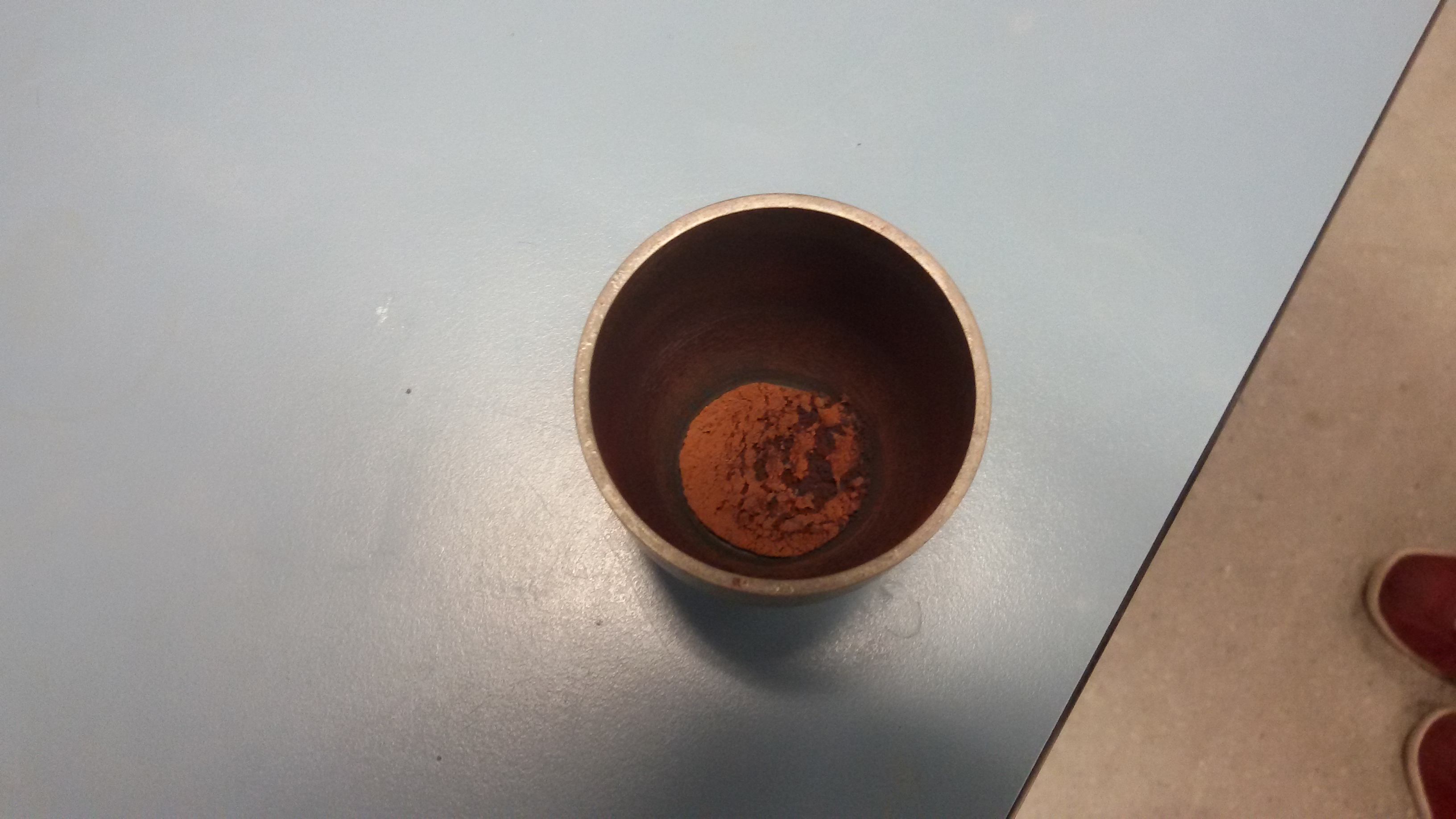 Síntesi de ferrita de ZINC. Realitzat a les pràctiques de la Universitat de Girona.